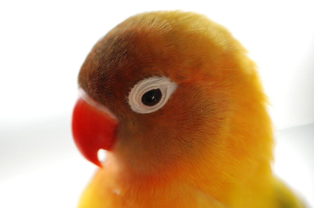 Fischer's Lovebird /